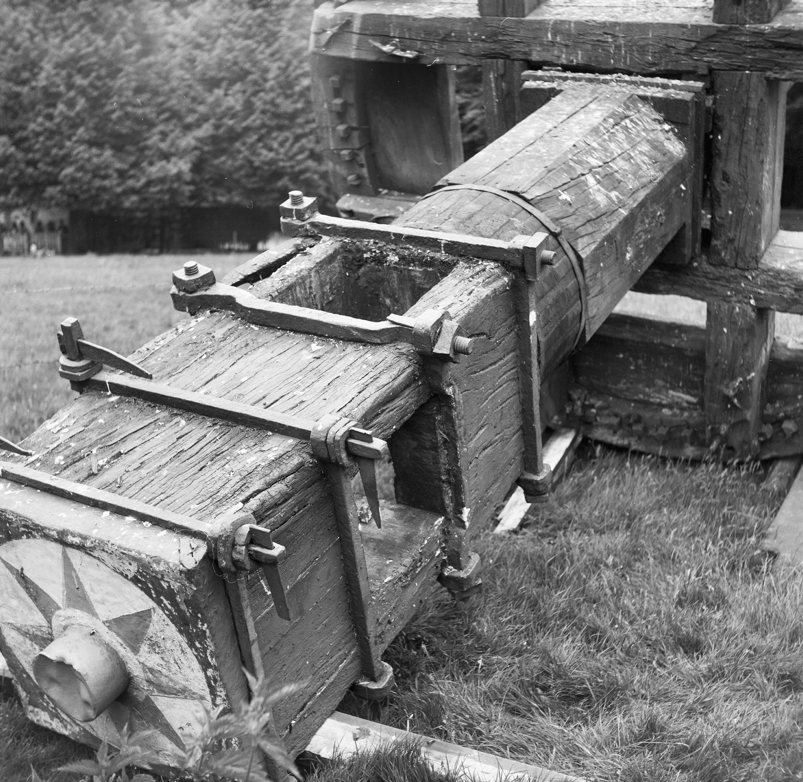 Diversen: restauratie molen, houten boven-as Openlucht Museum